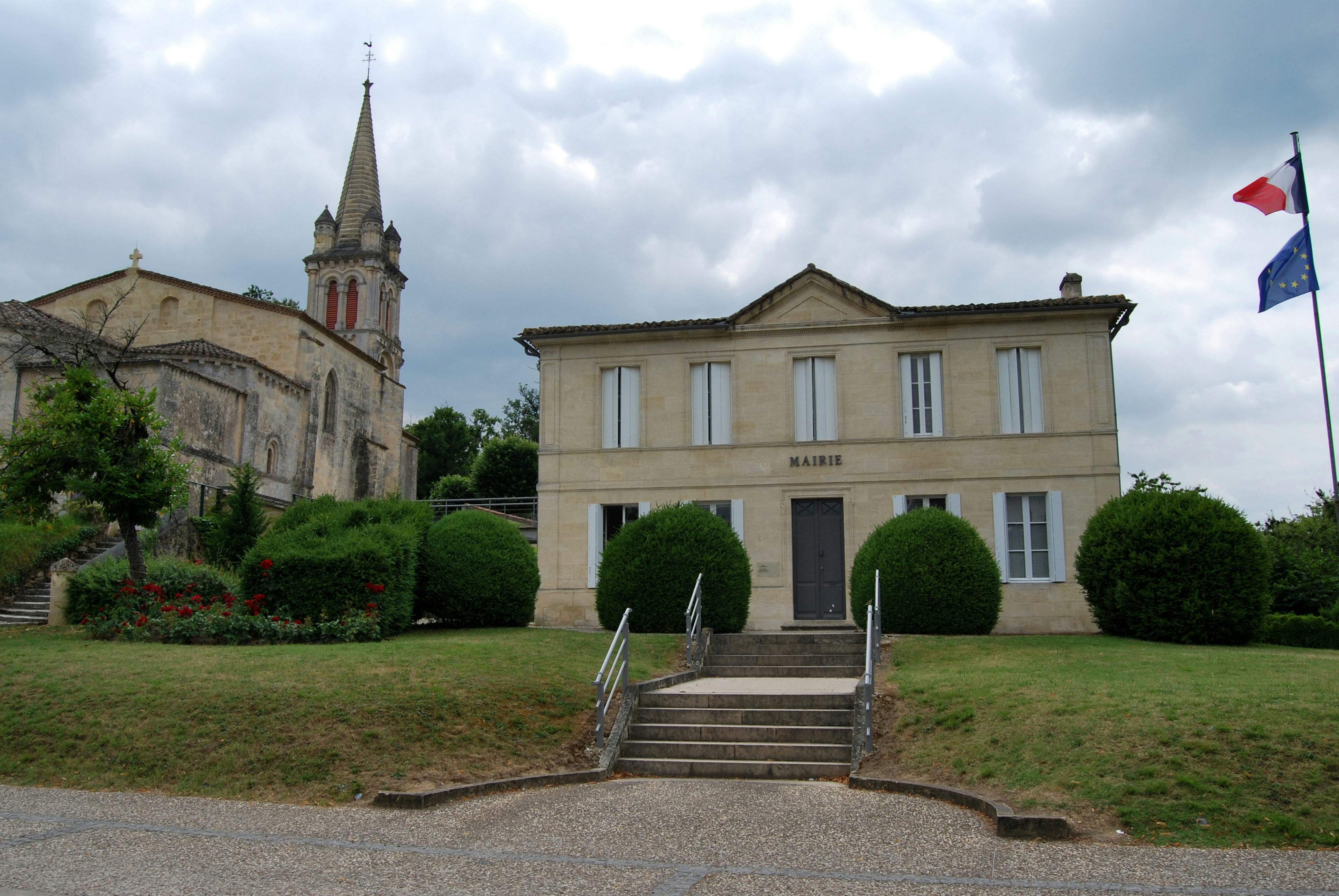 Lignan-de-Bordeaux Mairie